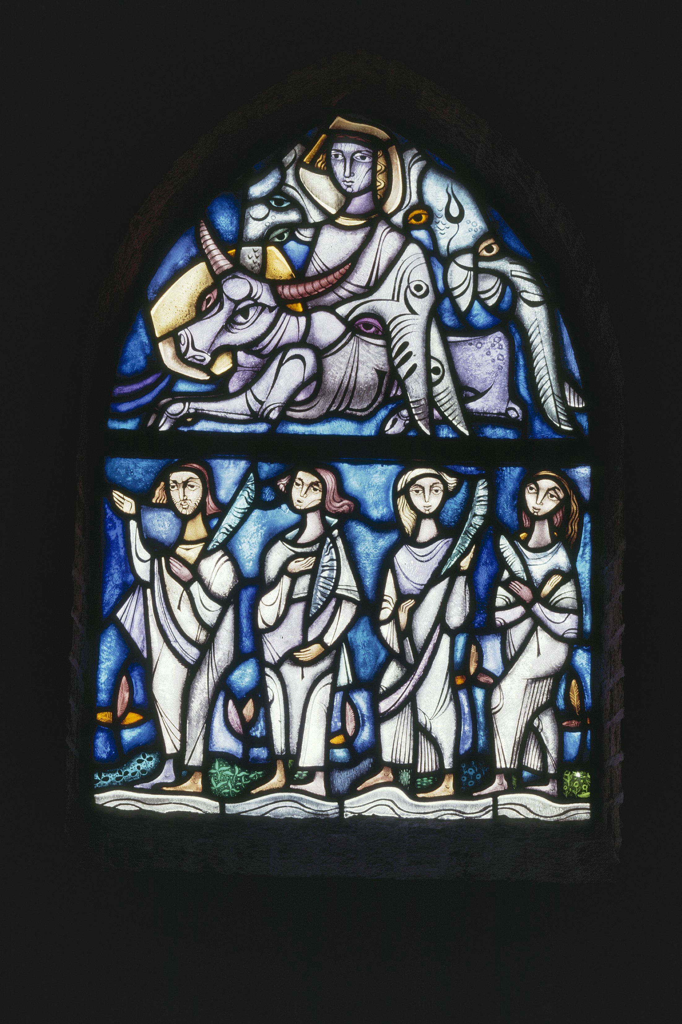 Sint Josephkerk: Interieur doopkapel, aanzicht gebrandschilderd glas-in-loodraam van Jan Willemen. (opmerking: Gefotografeerd voor Glas in lood in Nederland 1817-1968)